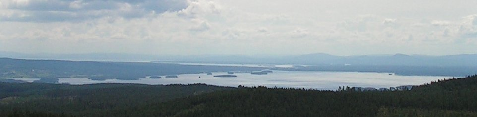 Orsasjön sedd från Grönklitt